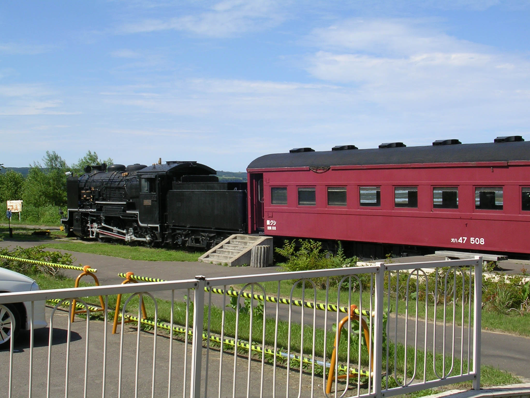 卯原内交通公園